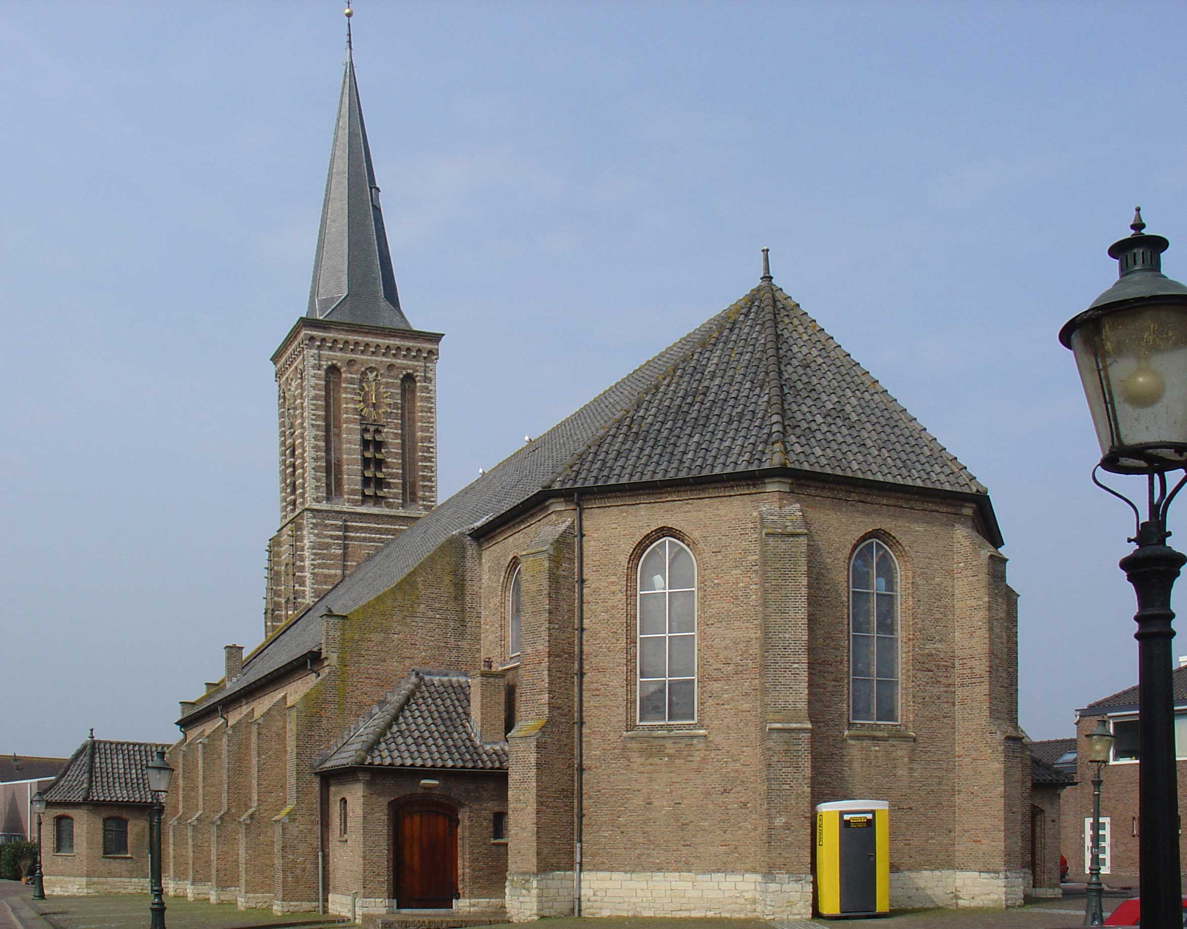 Kerk van Stolwijk